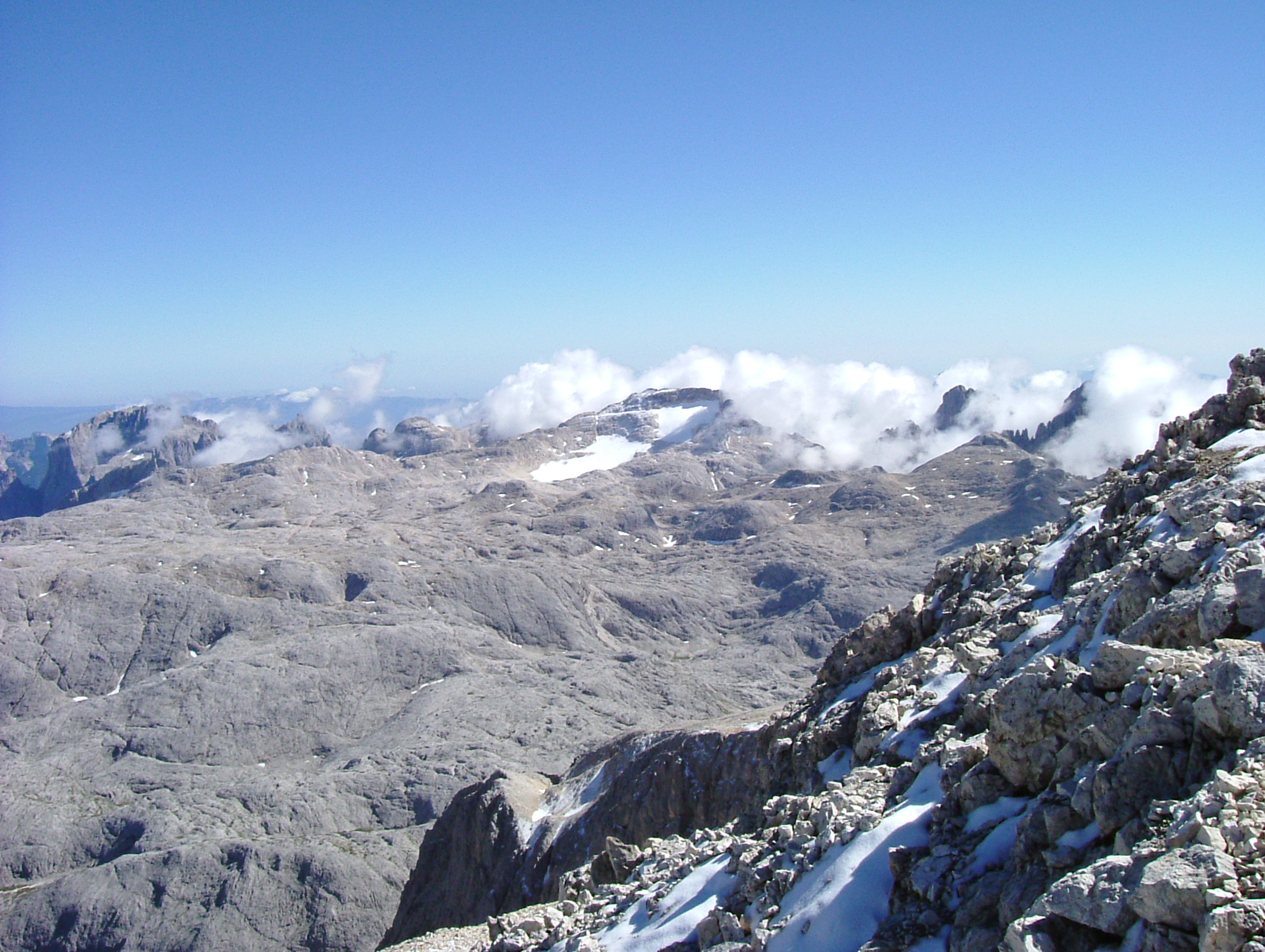 La foto è stata scattata da me dalla cima Vezzana